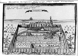 Холмогоры. Рисунок принцессы Екатерины Антоновны.